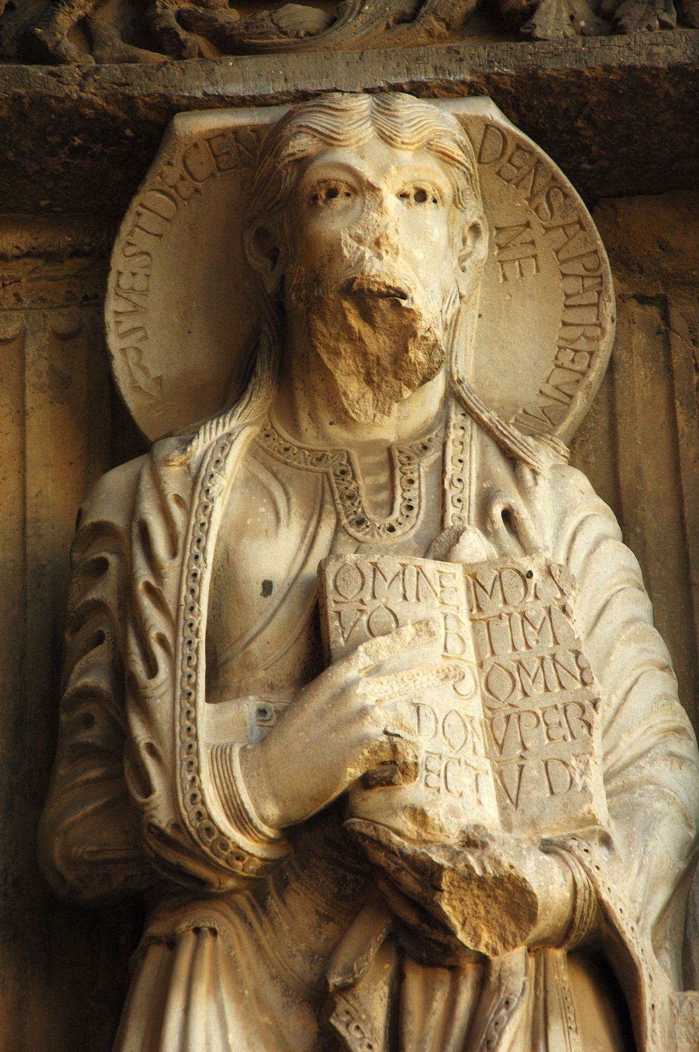 Romanesque church of Saint-Gilles-du-Gard, Saint-Gilles, département du Gard, France